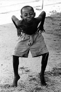 Enfant noir, reportage les Kroumans.